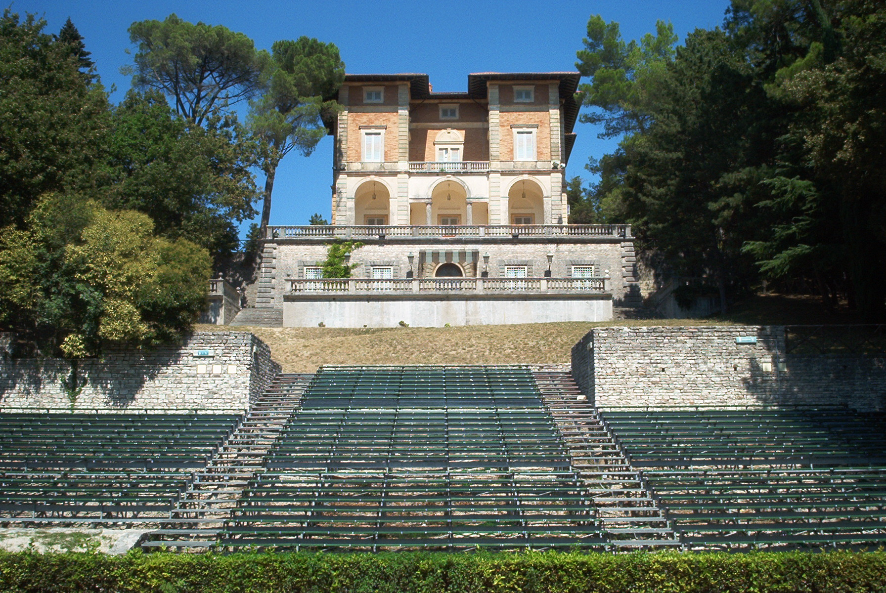 La Villa che si affaccia sul lago, con le gradinate per i concerti